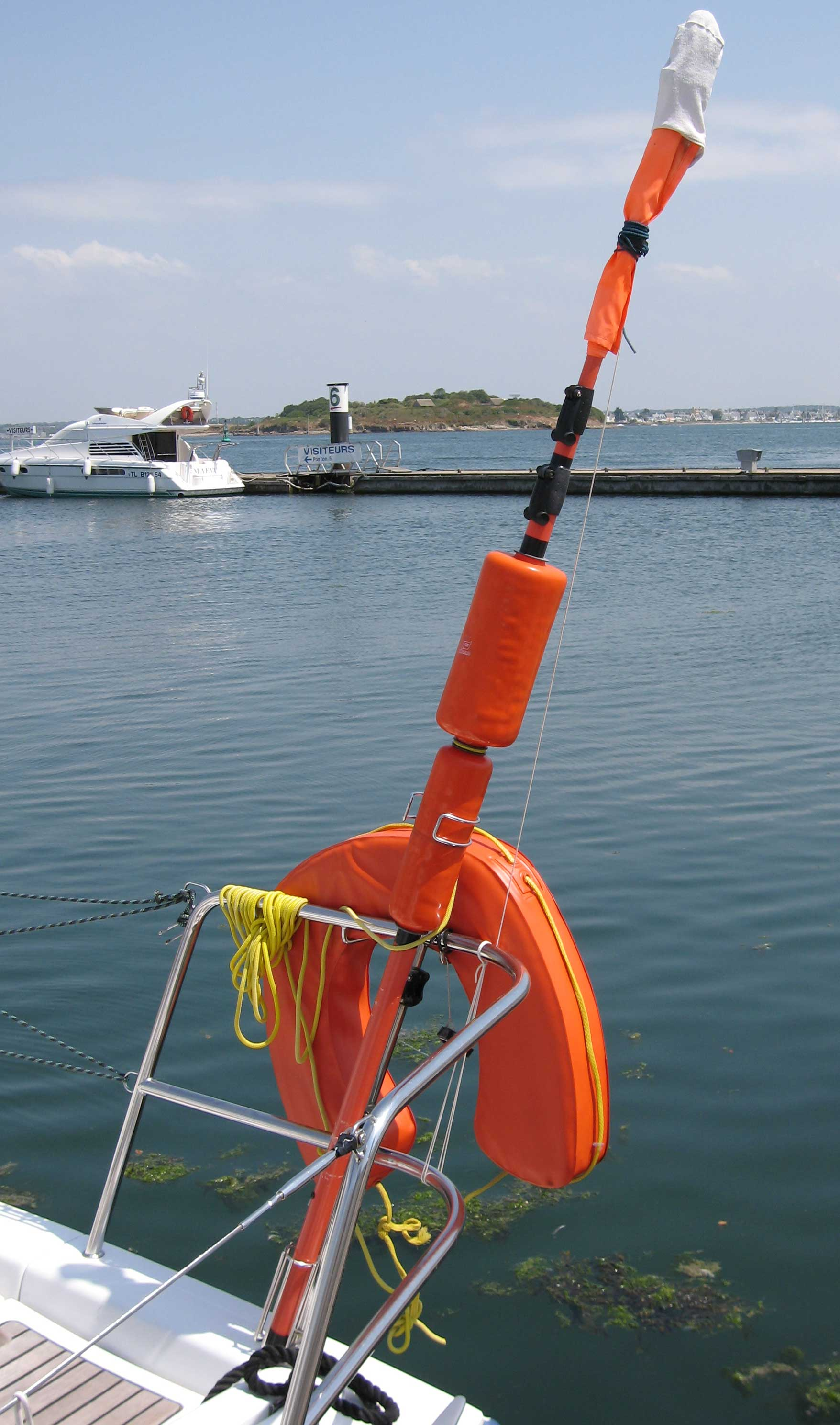 Description : Perche IOR Place : Lorient, France Date : 2006 Author : Pline Schéma ou photo personnelle